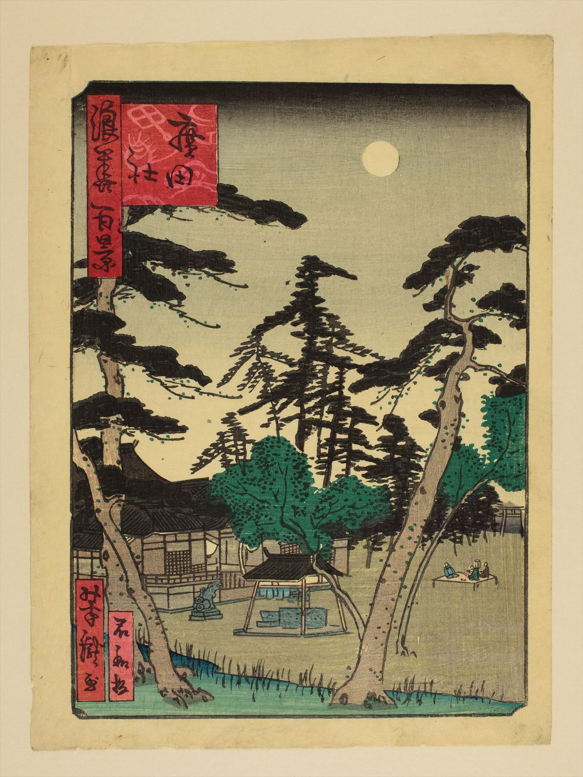 1800年代。里の家芳瀧/画。浪花百景 102枚のうちの1枚。大阪市立中央図書館蔵。